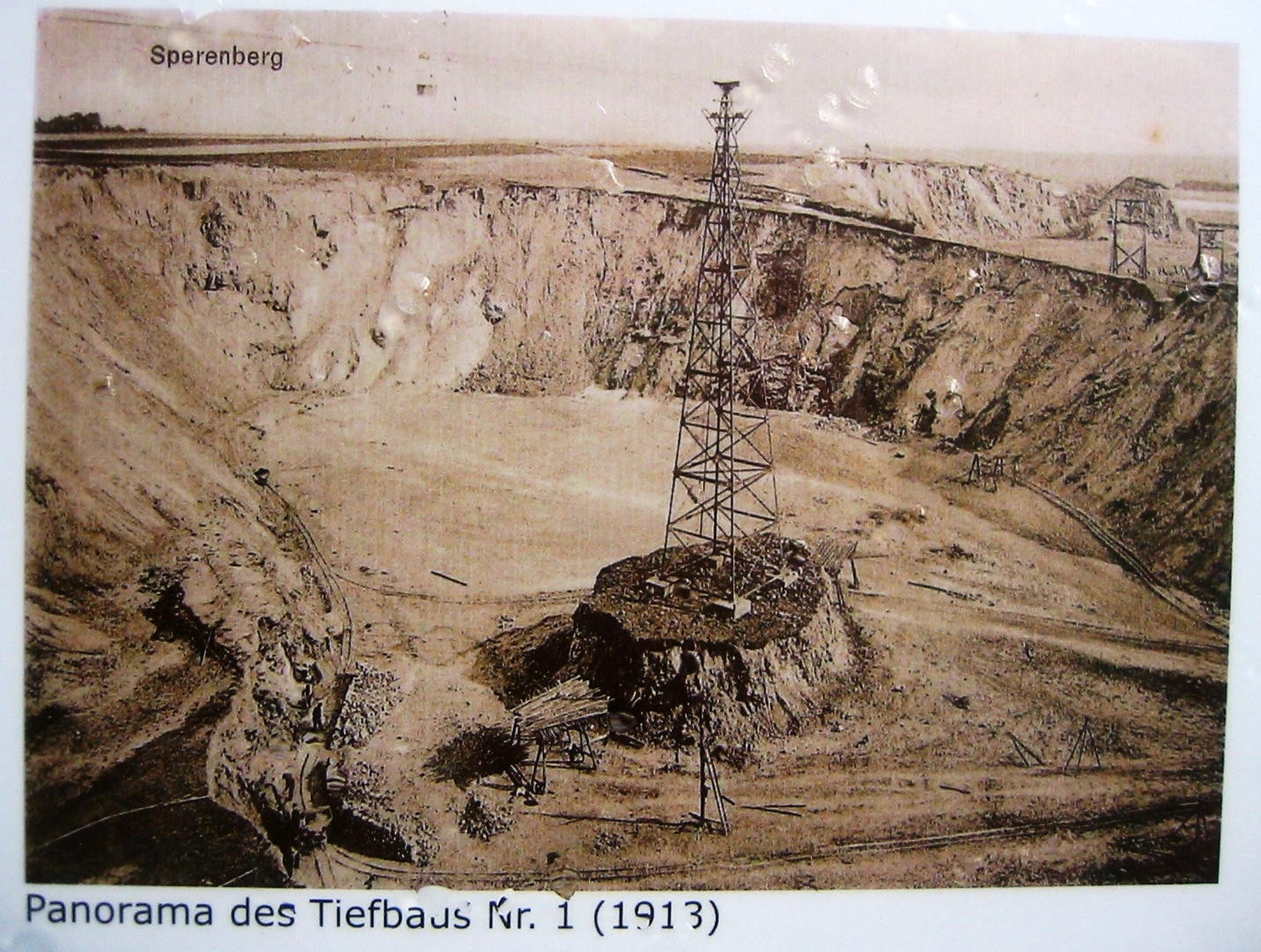 Blick in den Tiefbau (Gipsbruch) Nr. 1 in Sperenberg 1913, heute ein Ortsteil der Gemeinde Am Mellensee, Landkreis Teltow-Fläming, Brandenburg. Aufnahme von einer öffentlich zugänglichen Informationstafel des „Boden-Geo-Pfads“ in Sperenberg.